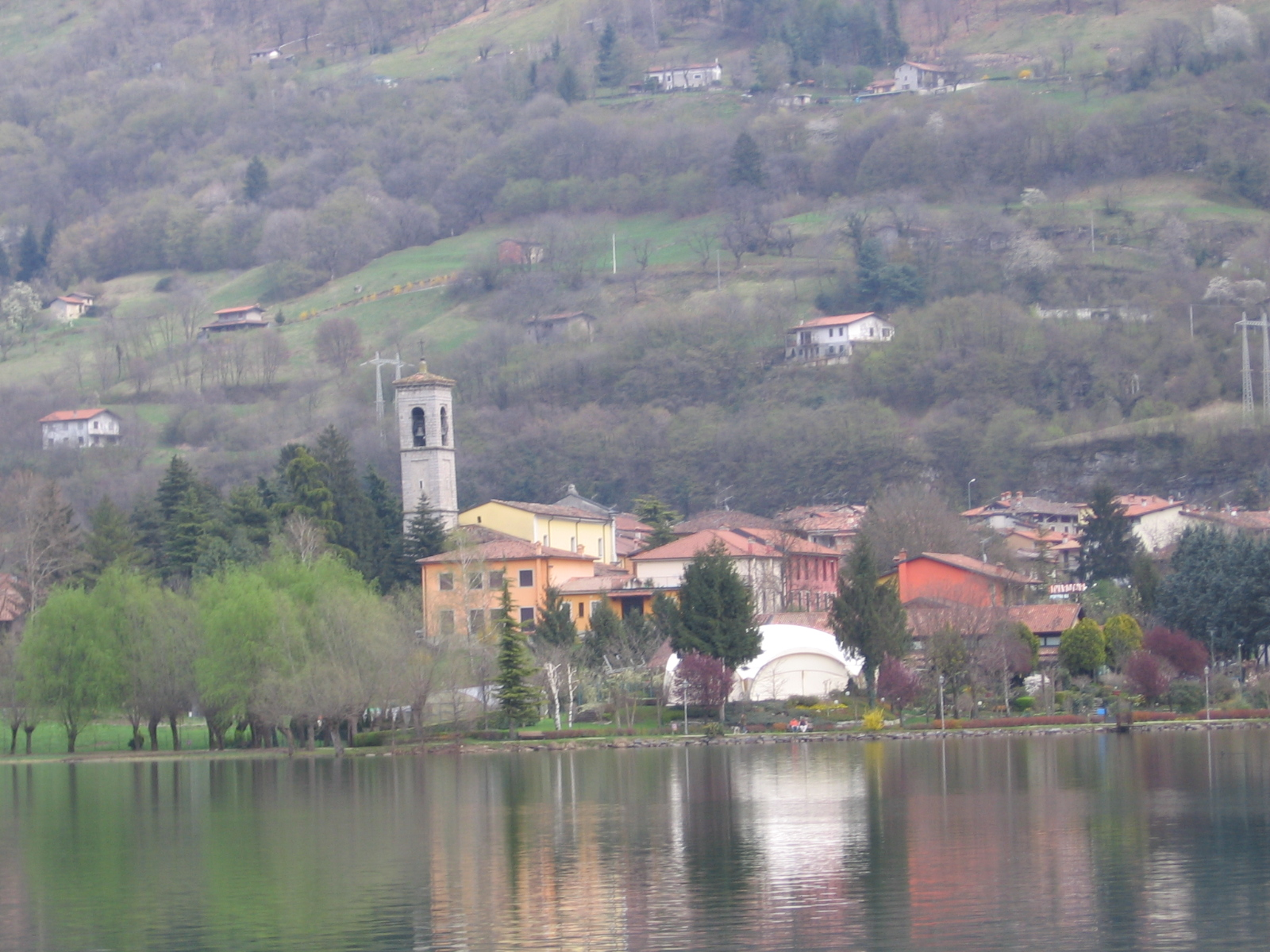 Monasterolo del castello, Bergamo, Italia